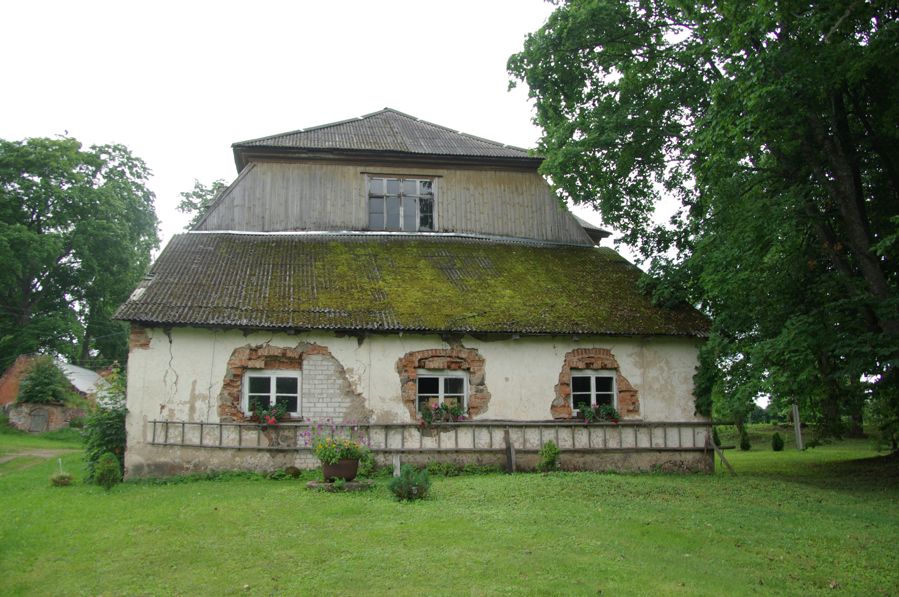 Põlva maakond, Räpina vald, Toolamaa küla